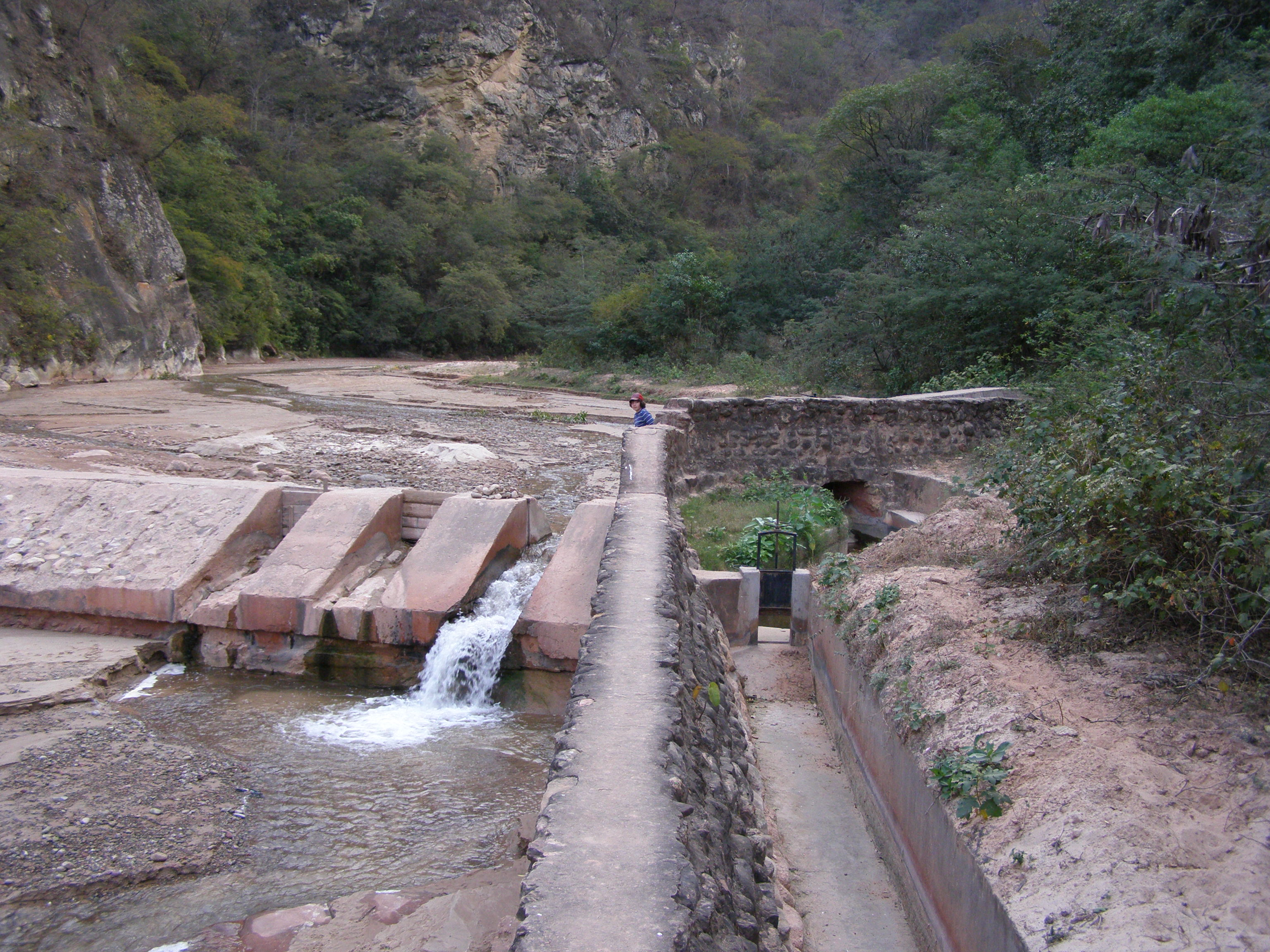 eigen werk